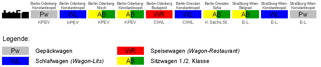 Zugbildung des Balkanzugs (Abschnitt zwischen Galanta und Budapest), Winterfahrplan 1916/1917. Quelle: Albert Mühl: Schlafwagen in Deutschland. Die Wagen und der Betrieb von den Anfängen bis zum Übergang auf die Mitropa. EK-Verlag, Freiburg 1996, ISBN 3-88255-680-3, Tabelle auf S. 117